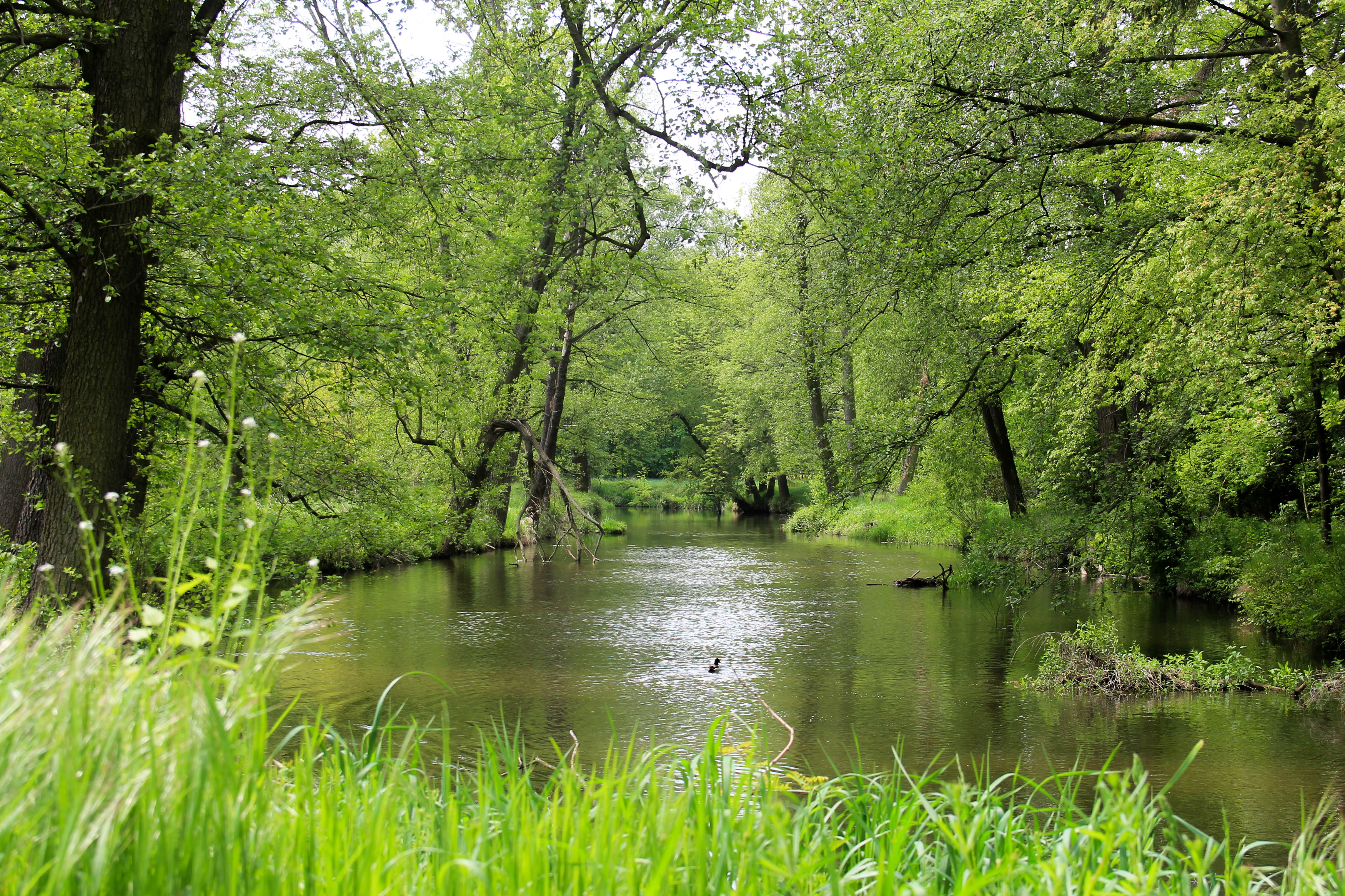 Rzeka Skora w sąsiedztwie jazu w Konradówce, gmina Chojnów